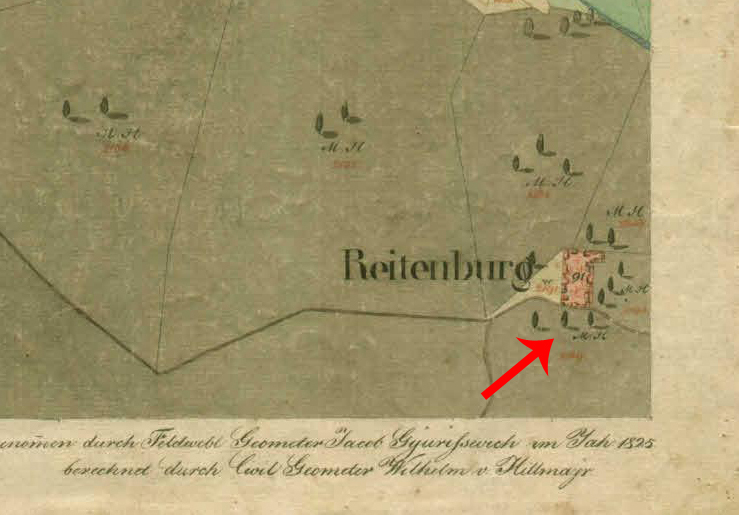 Franciscejski kataster za Kranjsko, 1823-1869